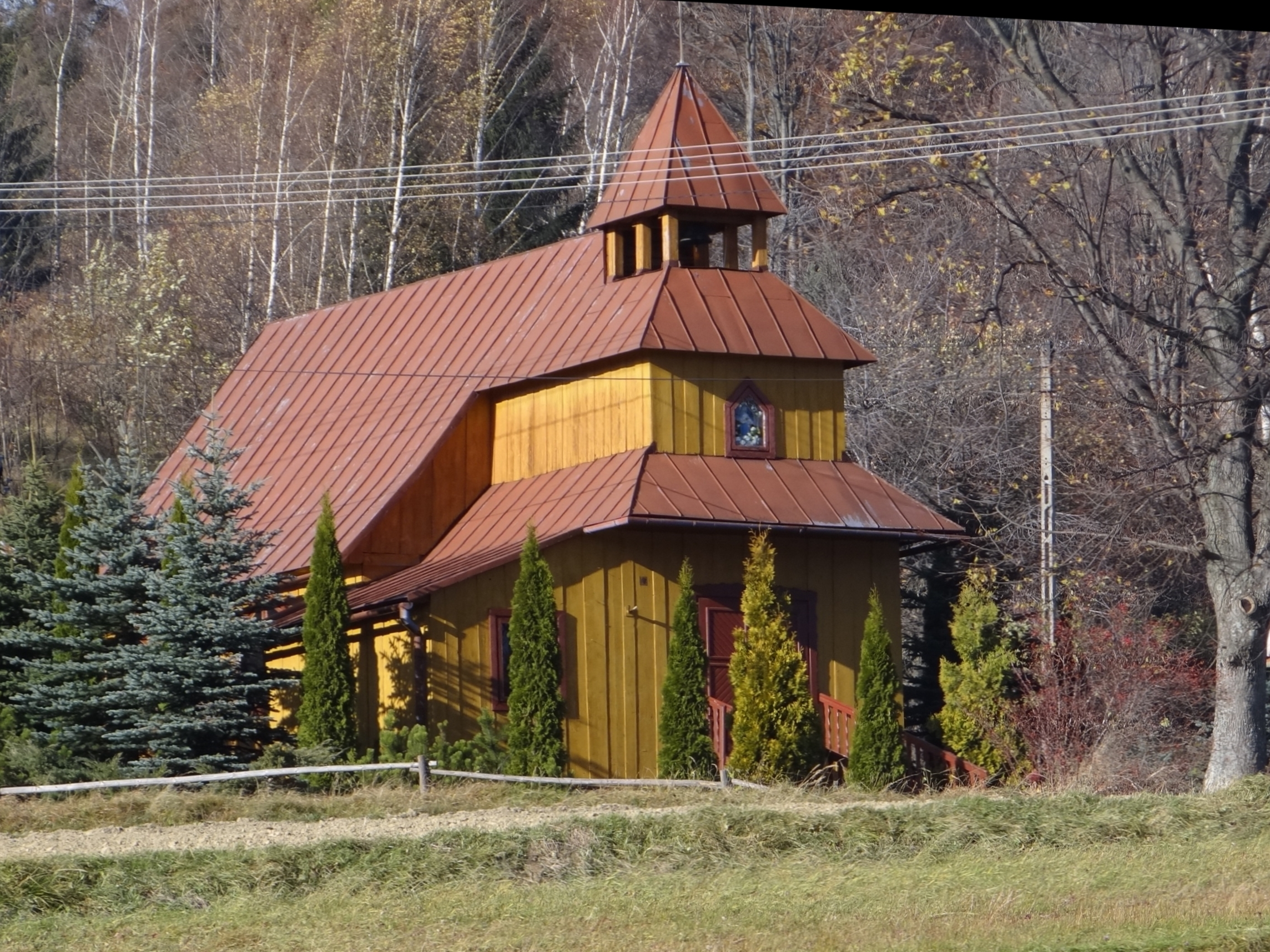 Kaplica Matki Boskiej Sidzińskiej na Wielkiej Polanie w Sidzinie